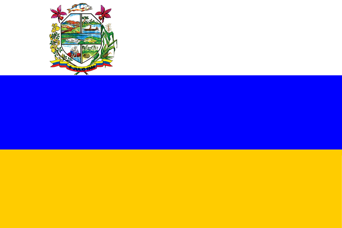 Bandera del municipio Bolivariano Angostura. Estado Bolívar. Venezuela